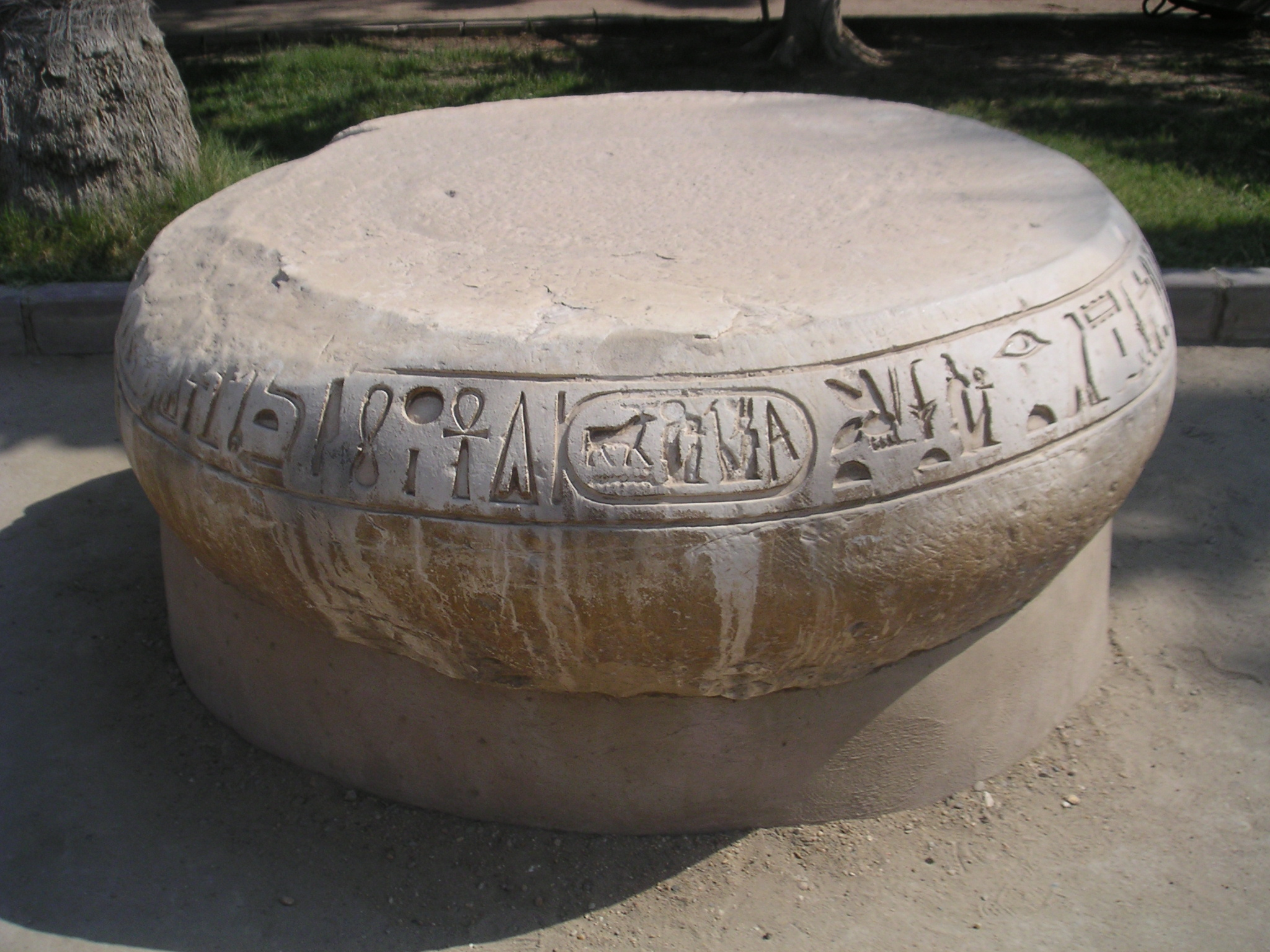 Base de colonne provenant du palais de Mérenptah à Memphis - Mit Rahineh, Musée en plein air - juillet 2004